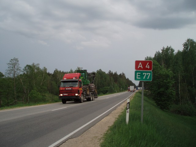 Rīgas apvedceļš, 2007. gada 28. maijs. Foto - Modris Frikmanis.